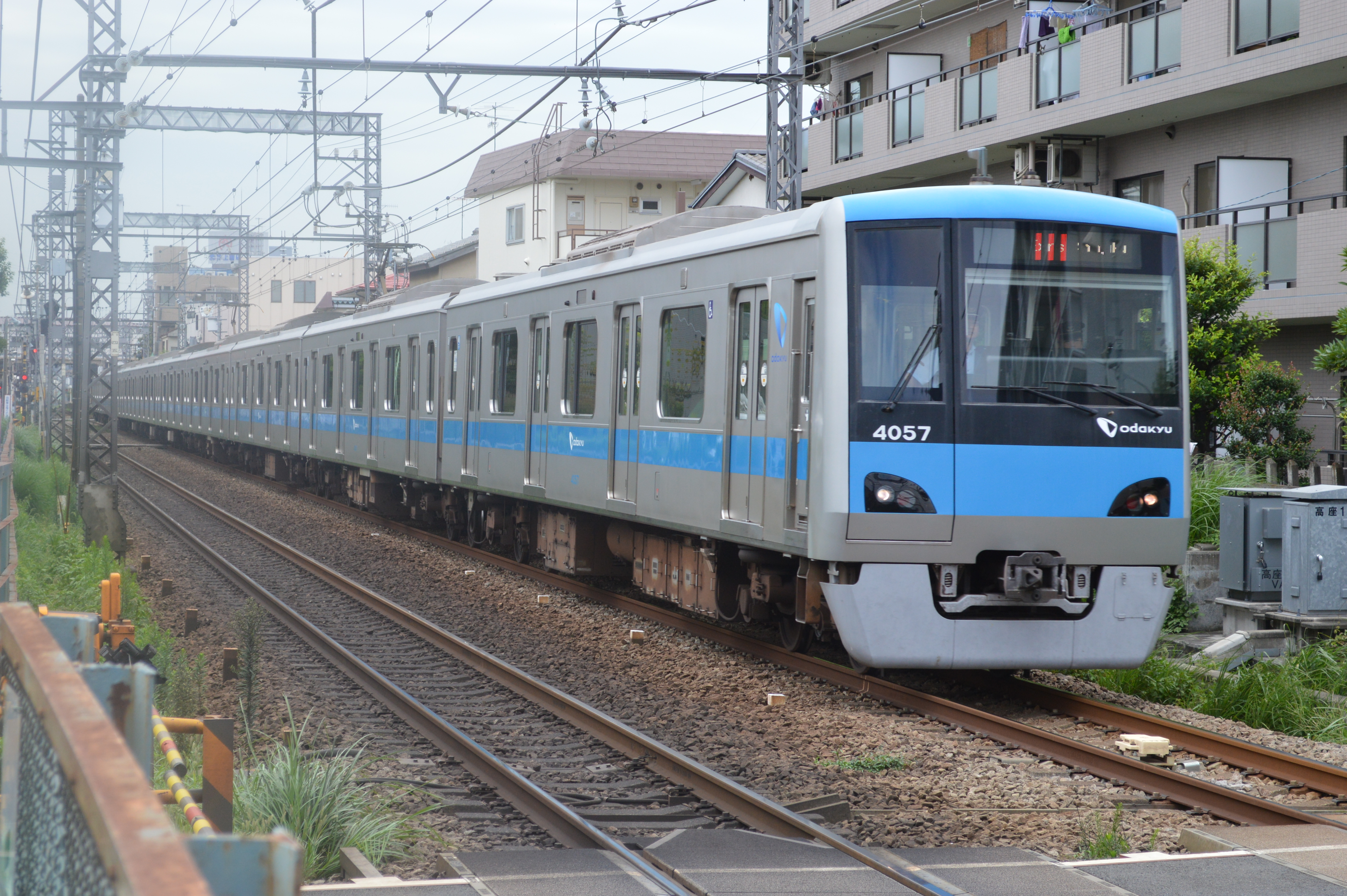 小田急電鉄4000形 - 小田急電鉄江ノ島線にて撮影 (長後駅 - 高座渋谷駅間 上り方面)